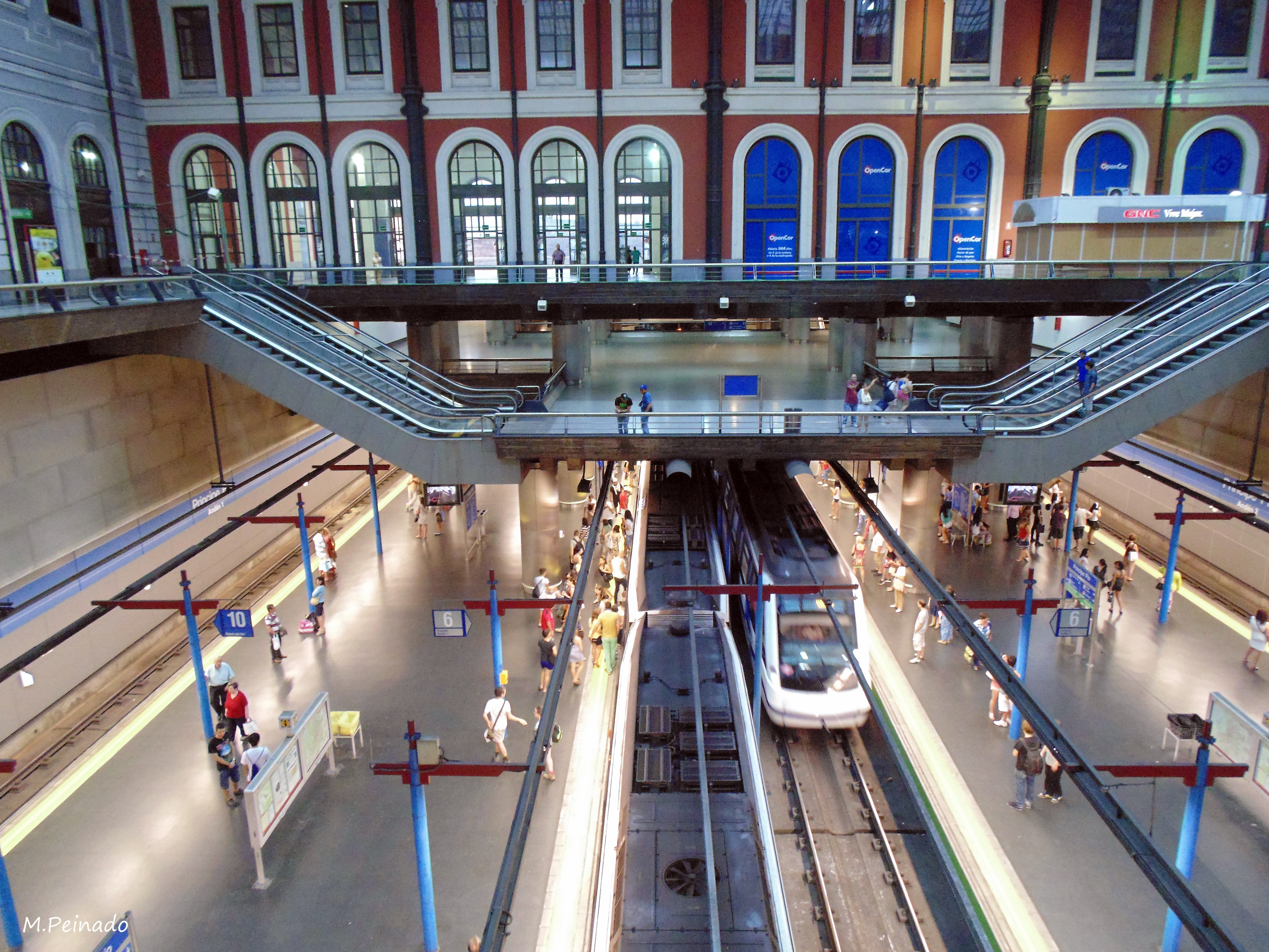 Estación de Príncipe Pío Madrid Comunidad de Madrid España